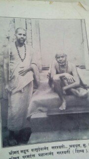 हे खाली बसलेले श्रीस्वामींचे संन्यासगुरू - परमहंस परिव्राजकाचार्य श्रीमत् वासुदेवानंद सरस्वती ( पोटे) स्वामी (पुणे - नाशिक रोडवरील आळे येथील पोटे स्वामी) होत. यांच्याकडून श्रीप्रज्ञानानंद सरस्वती स्वामींना(शेजारी उभे असलेले) संन्यासदीक्षा (दंड) प्राप्त झाली.